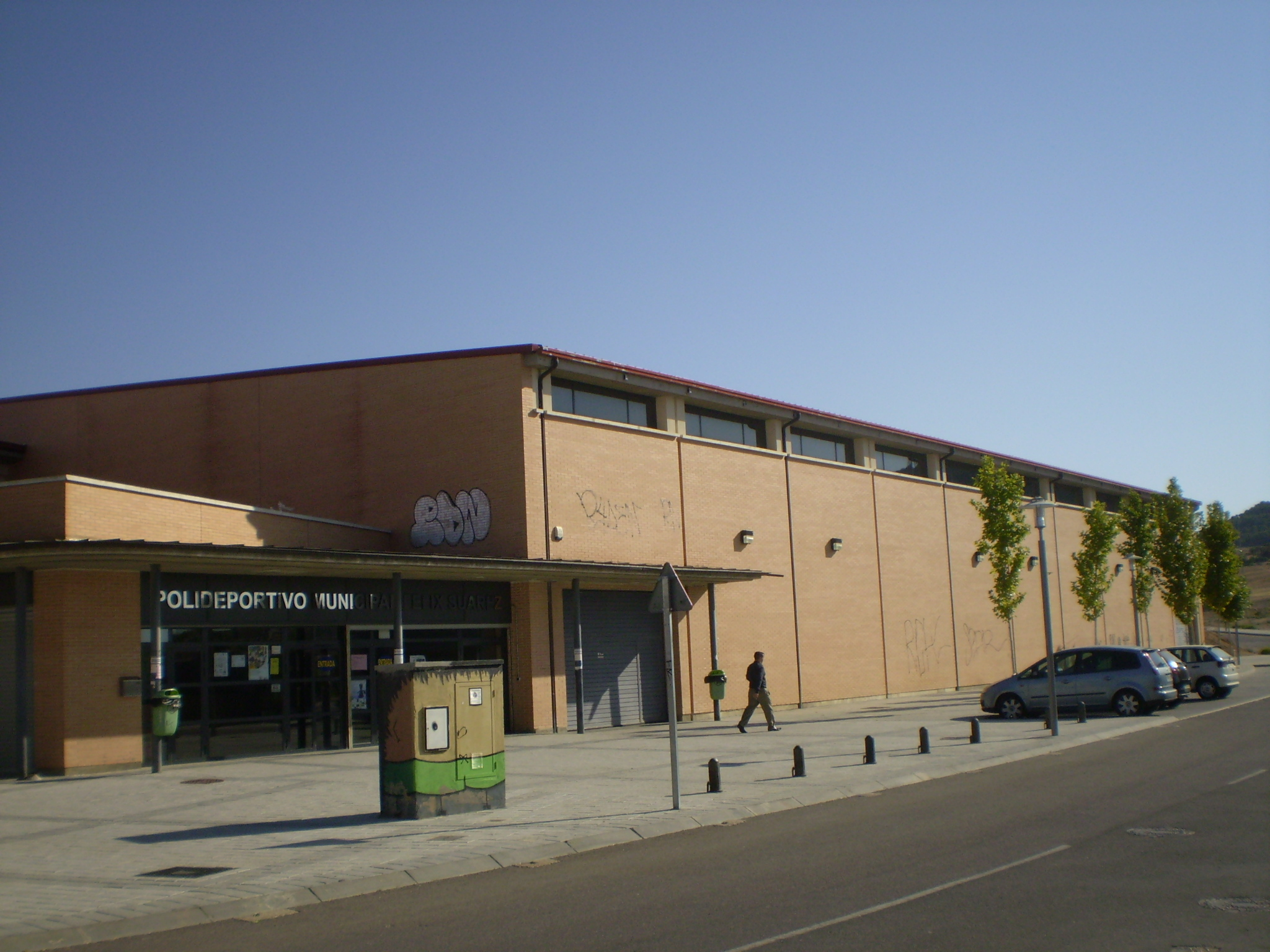 polideportivo la cisterniga valladolid españa